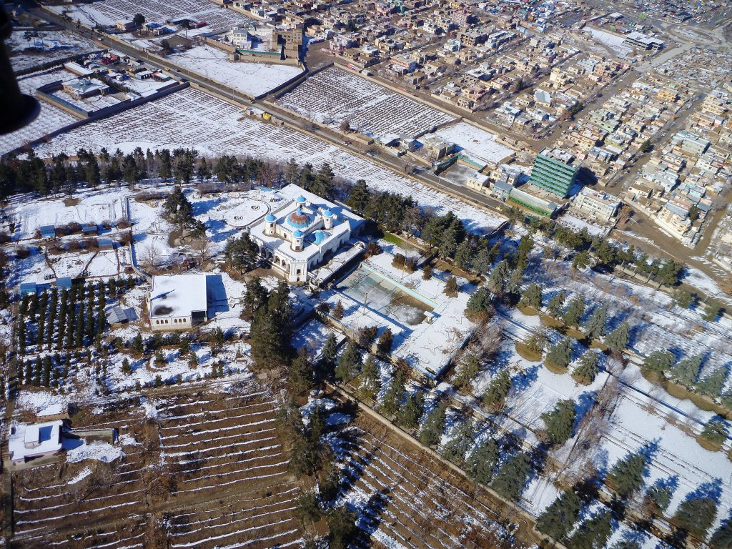 Bagh e Bala